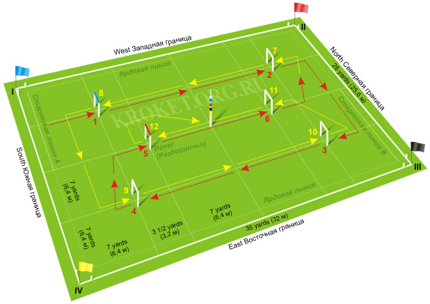 Разметка поля для игры в крокет и схема прохождения воротец.